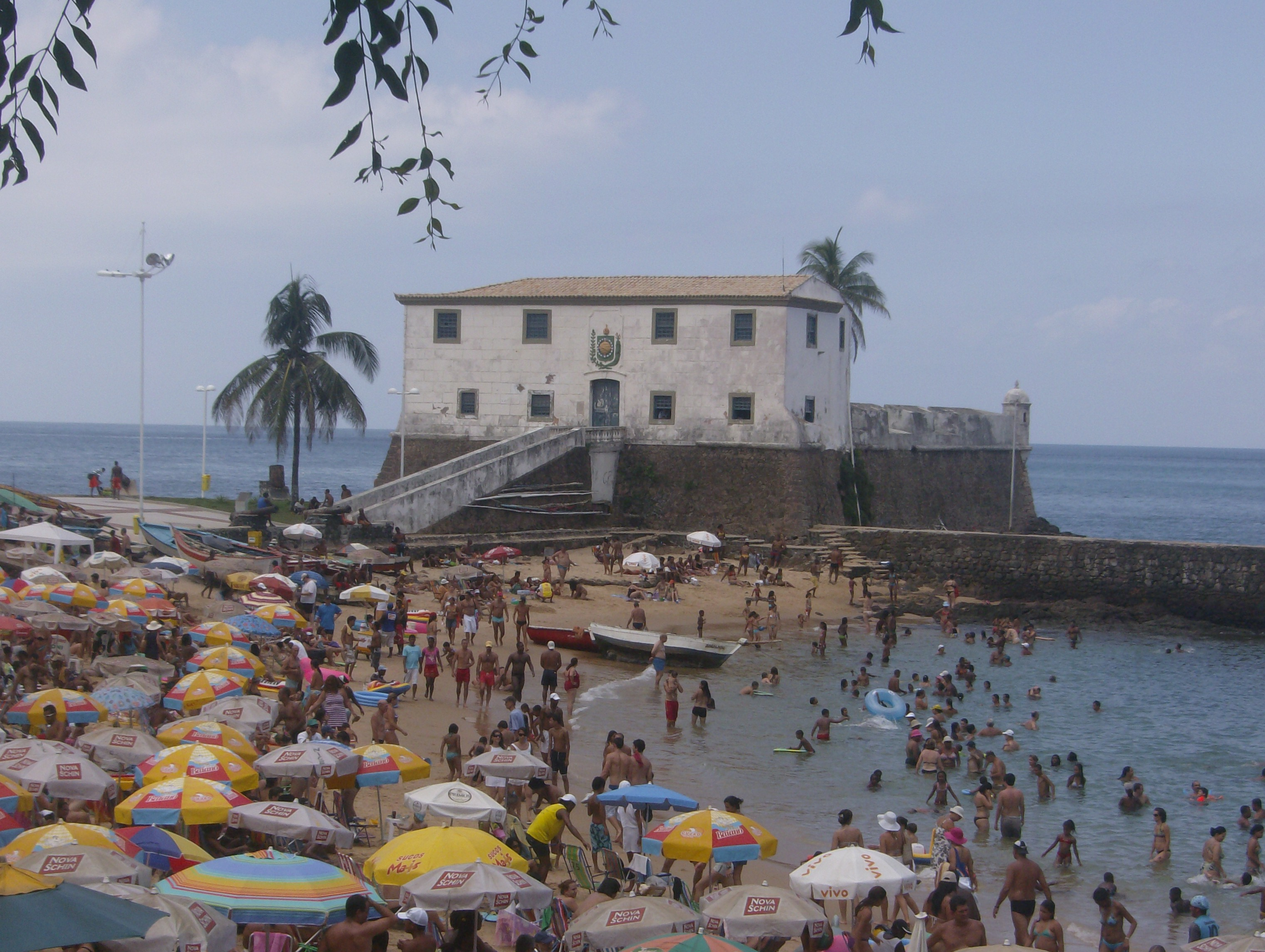 O Forte de Santa Maria, Salvador, Bahia, Brasil.